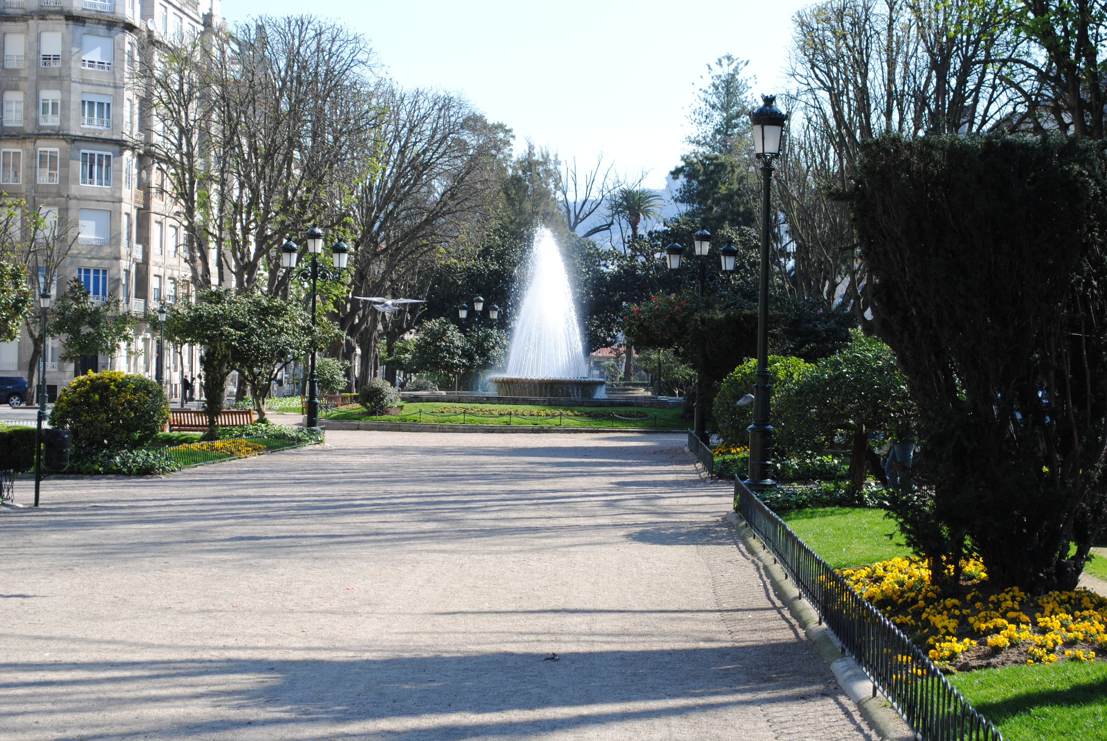 Alameda de Compostela, Vigo